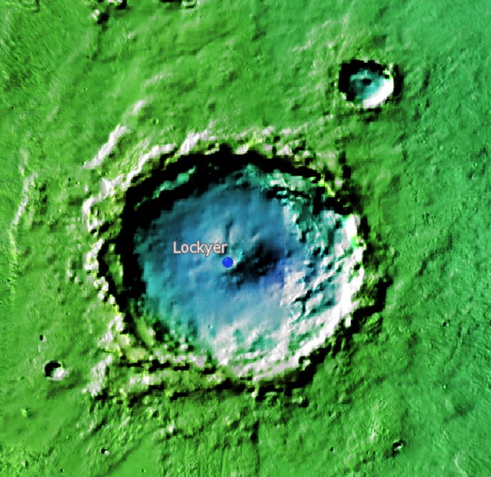 Cráter marciano Lockyer. (Imagen IAU/USGS/Goddard/A SU/USGS)